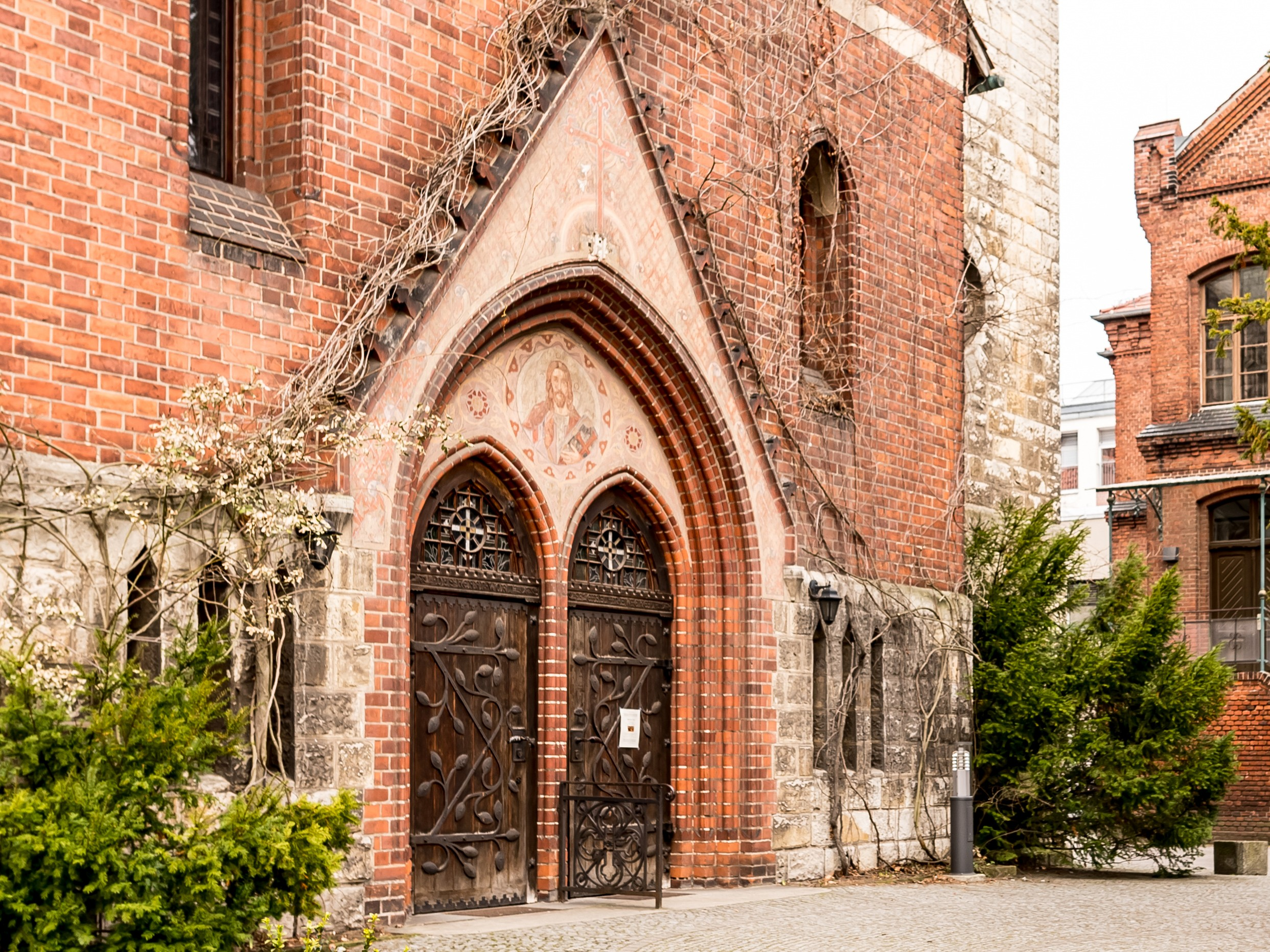 die Oberlinkirche auf dem Campus des Oberlinhaus in Potsdam-Babelsberg